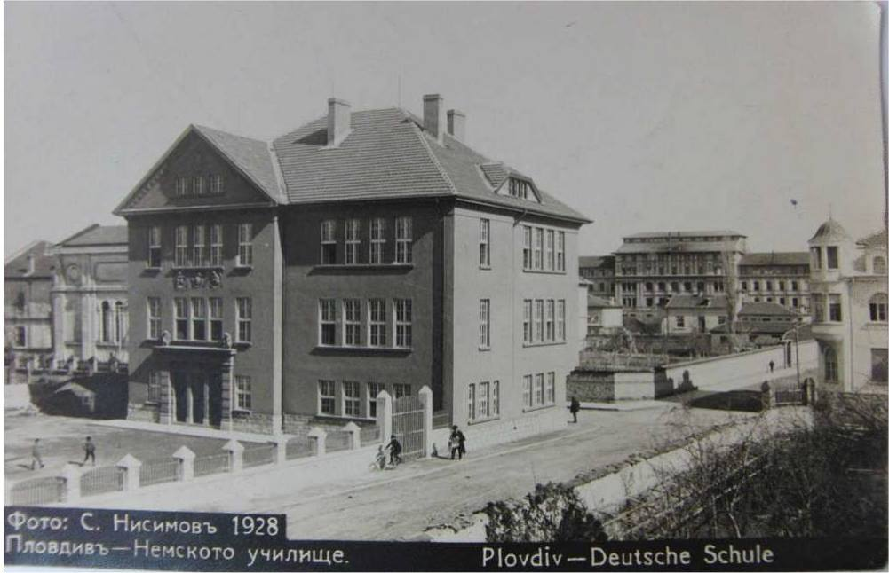 Postcard from 1928, The German school in Plovdiv, Немското училище в Пловдив през 1928 г.